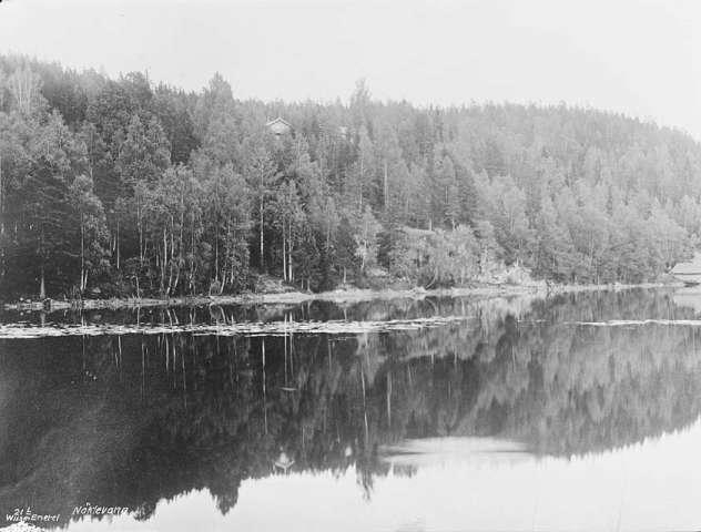 Sarabråten ved Nøklevann